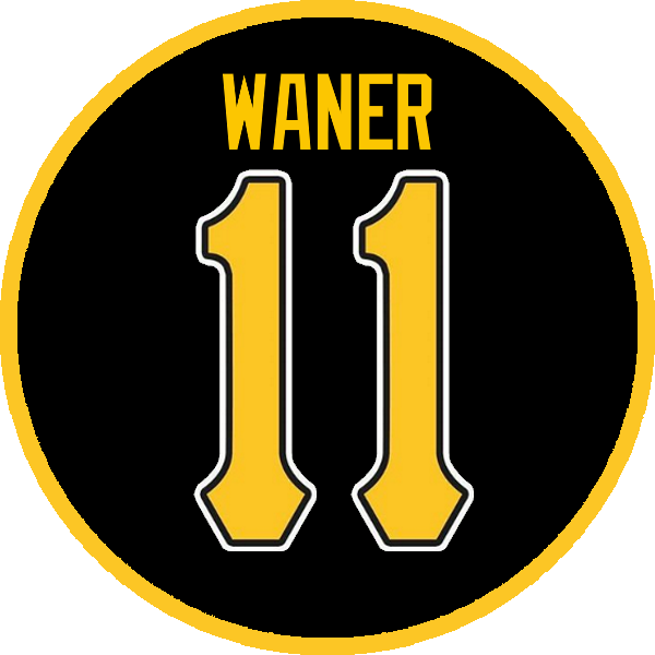 illustration of Pittsburgh Pirates retired number